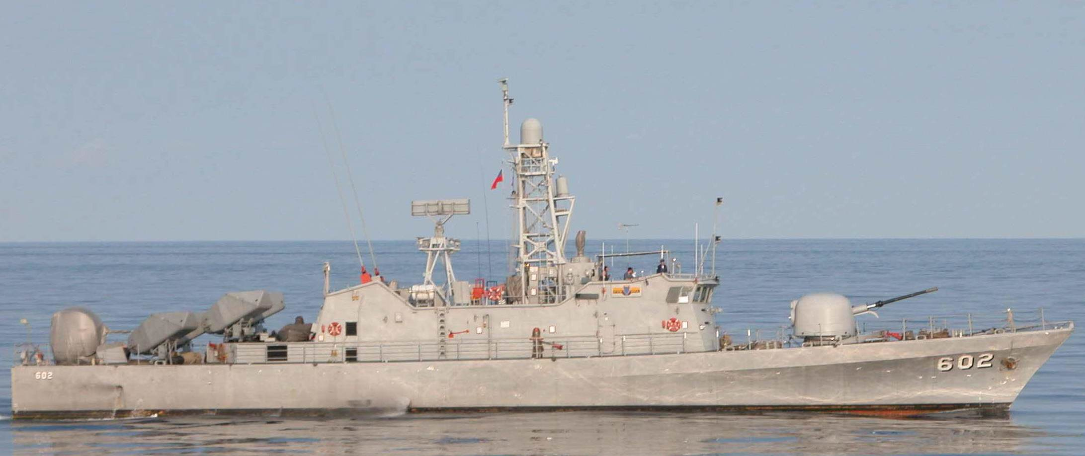 中華民國海軍綏江軍艦(PG-602)。